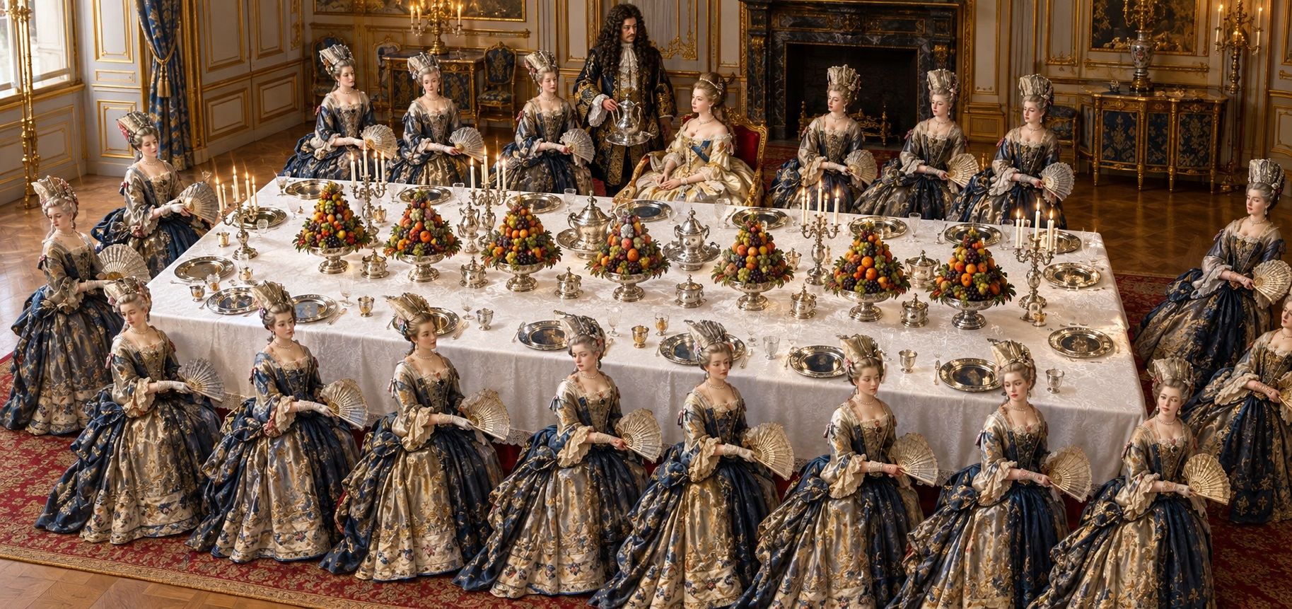 Restitution de la collaction donnée à la reine Marie-Thérèse par Louvois en juillet 1681 à Meudon.